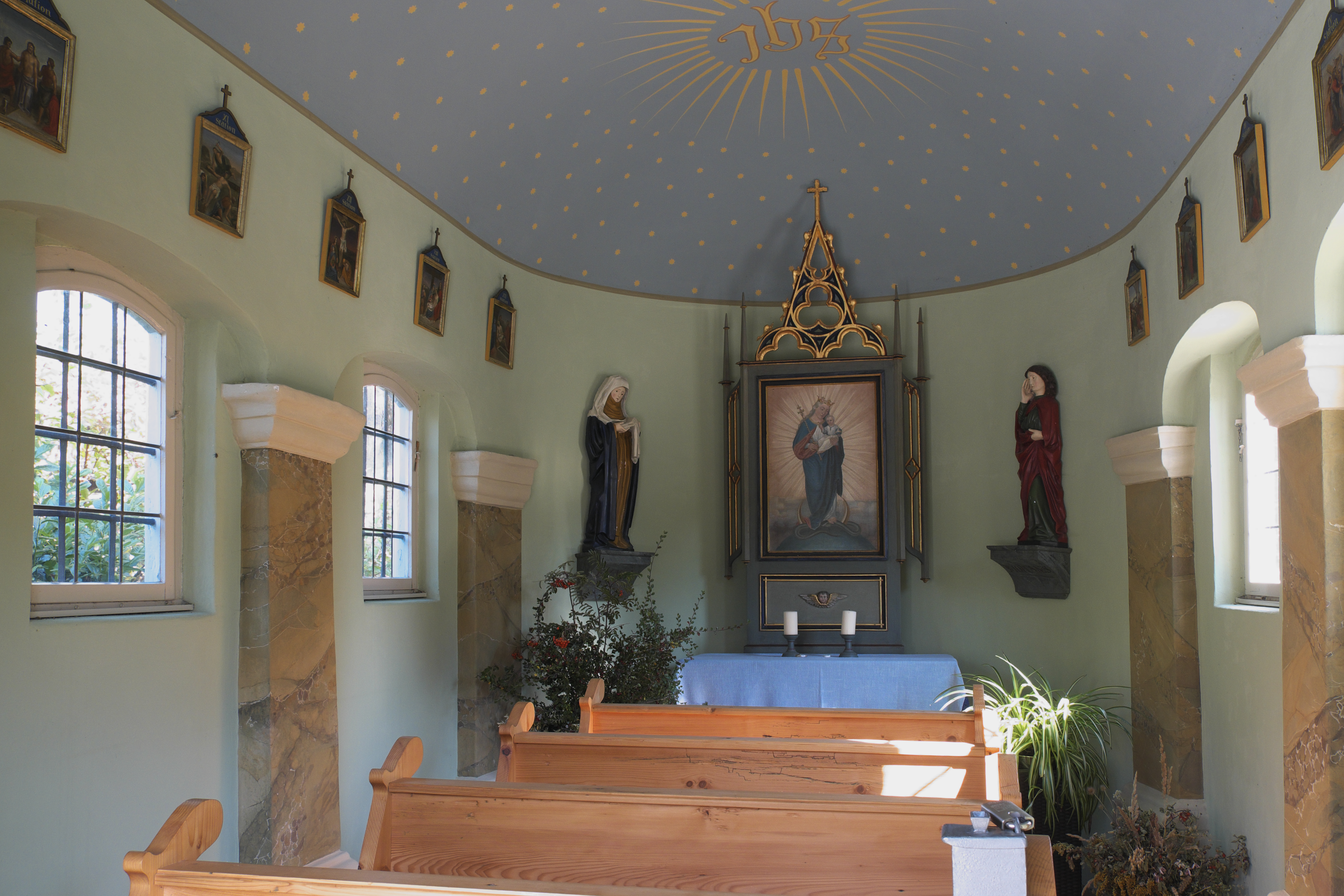 Katholische Kapelle St. Maria in Nebel (Germering) im Landkreis Fürstenfeldbruck (Bayern/Deutschland), Innenraum